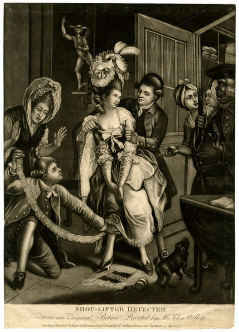 Паньонка, захоплена на крадіжці в крамниці. 1778 р.jpg: офорт та меццо-тінто, Британський музей 8 (William Hogarth: Shop-Lifter Detected)